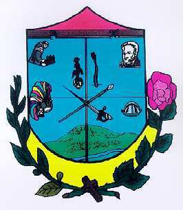 Escudo de Ahuacatlán